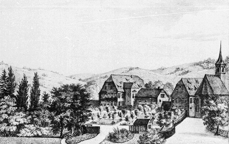 Treschklingen, Lithographie nach Zchg. von Carl von Gemmingen, Mitte 19. Jhd.